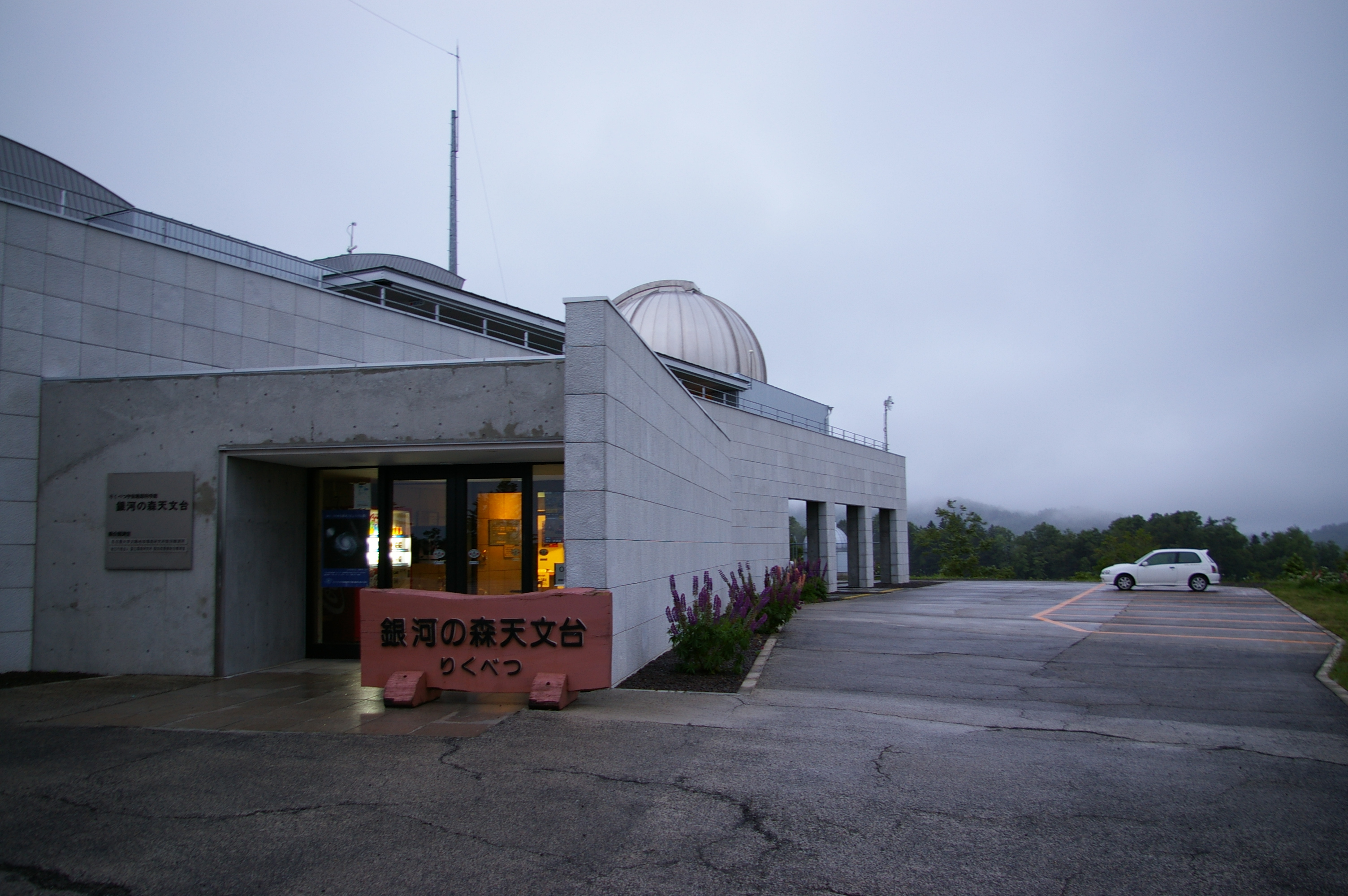 陸別町銀河の森天文台